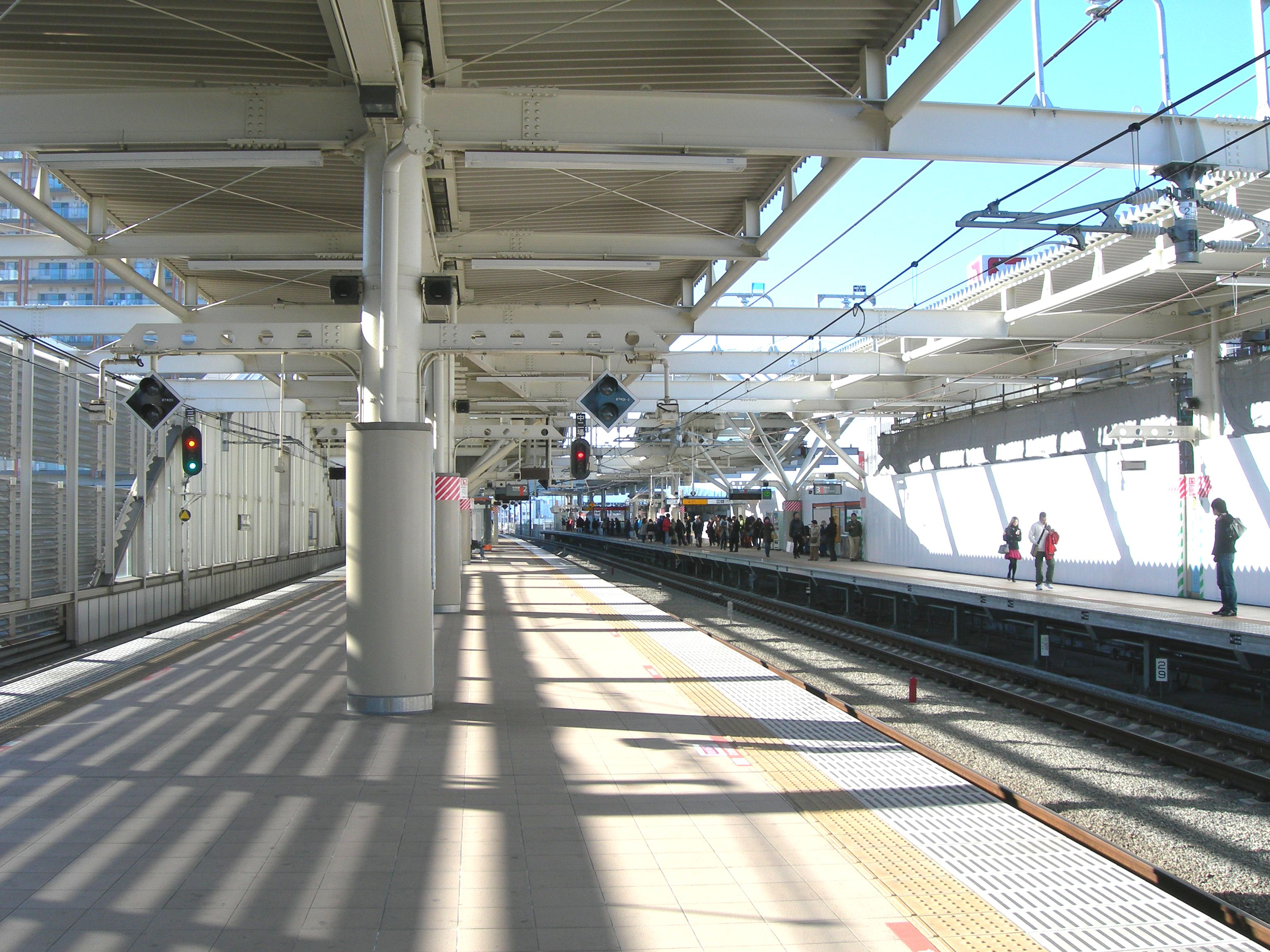 武蔵小金井駅プラットホーム